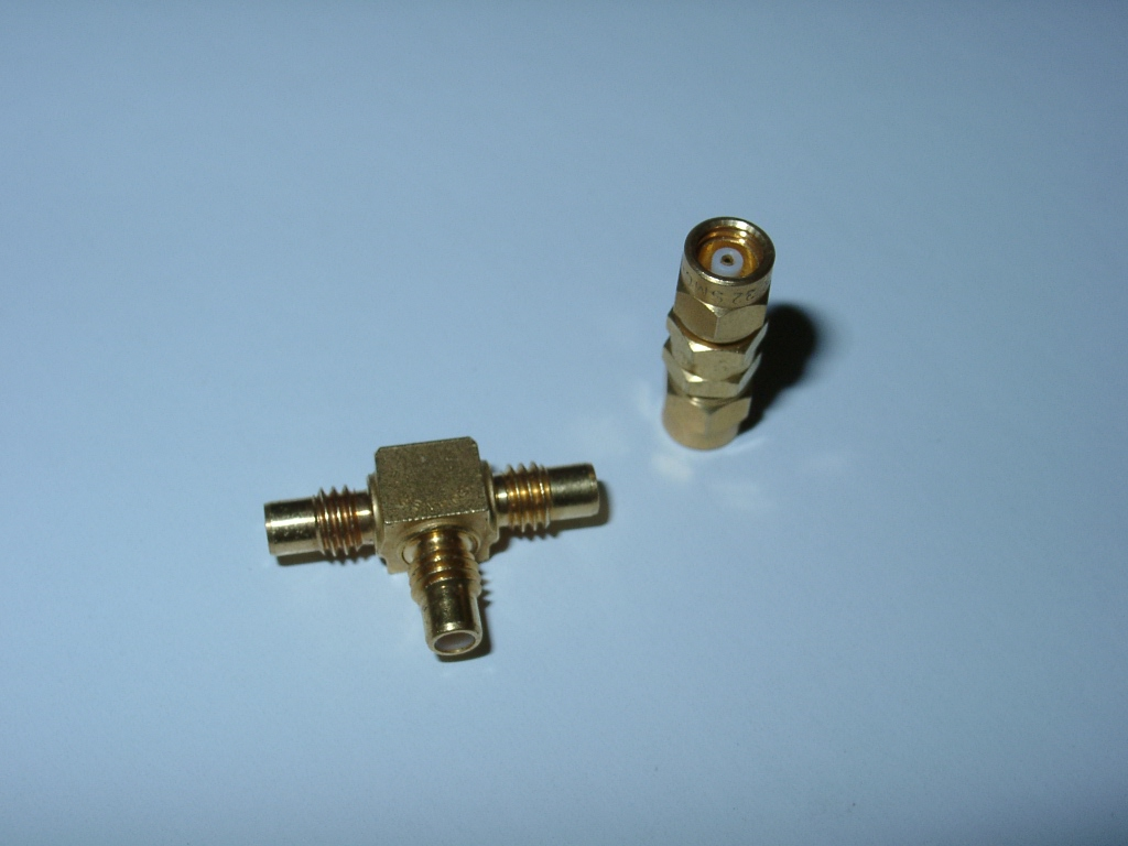 SMC-Steckverbinder Sonstiges